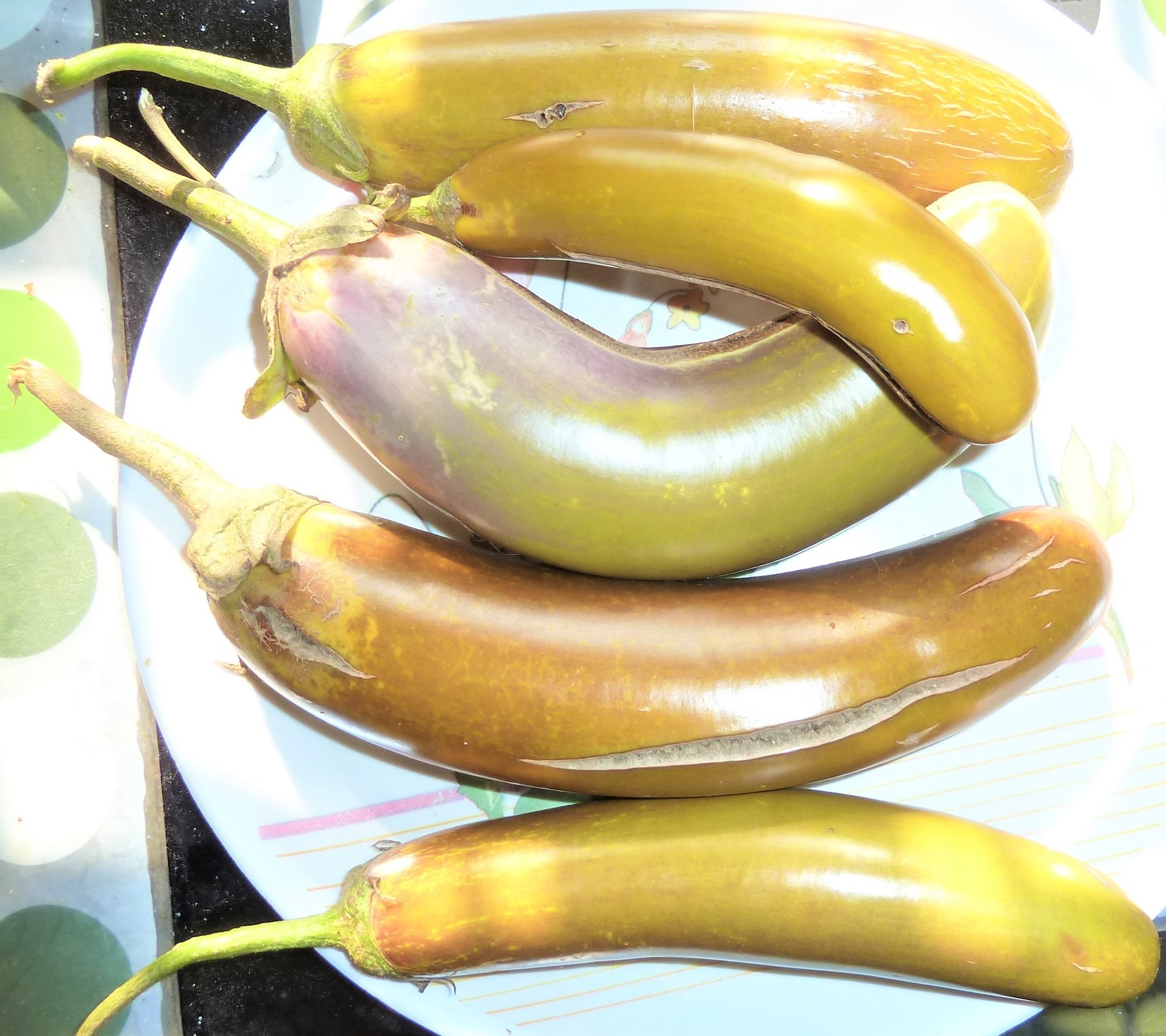 పచ్చడి (ఊరగాయ) వంకాయలు